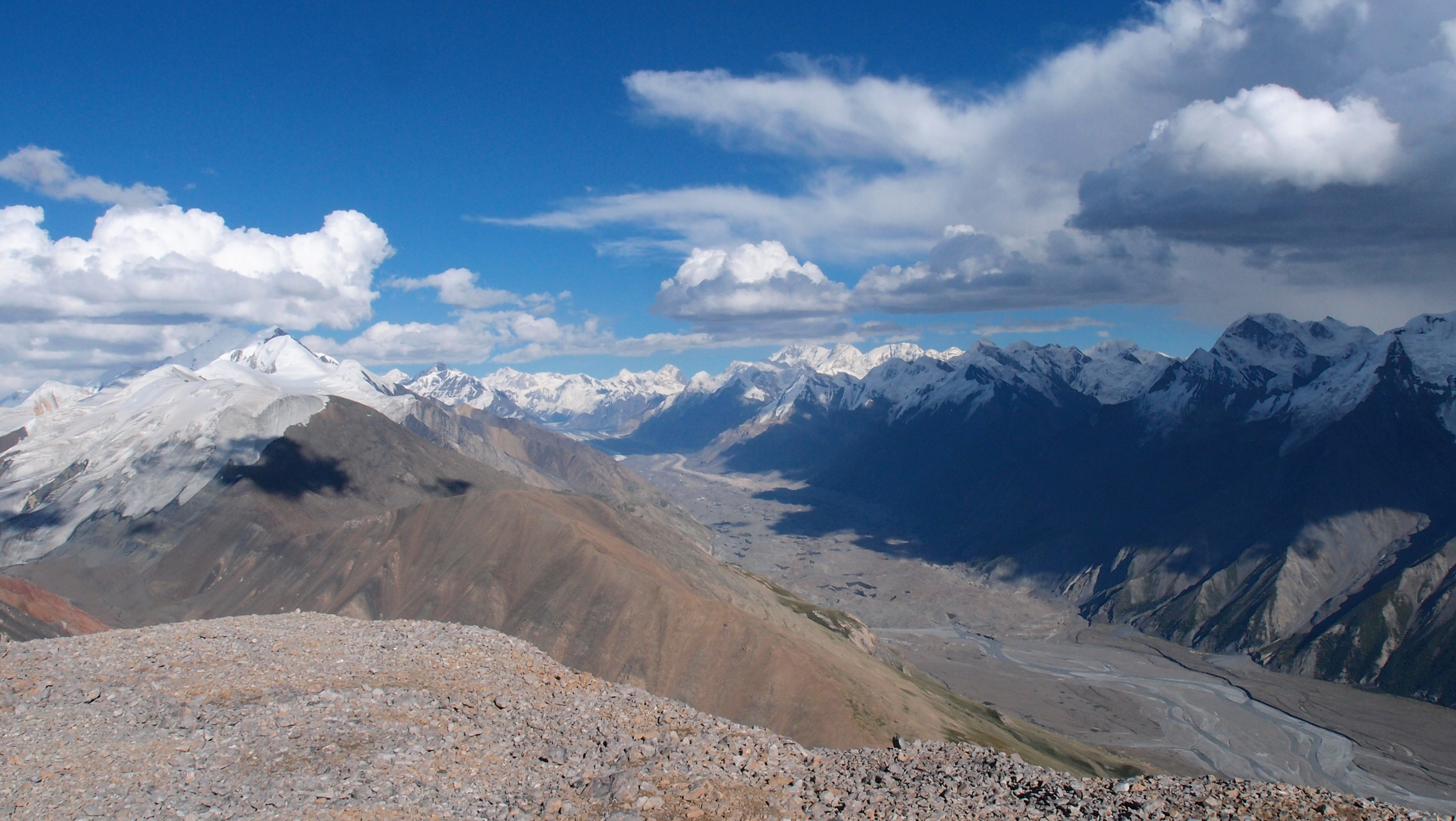 Pohled na ledovec Inylchek z vrcholu Pik Vit